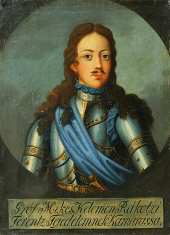 Mikes Kelemen. Ismeretlen festő, 19. század harmadik negyede, 18. századi ismeretlen mester után. Az ovális keret alatt felirat: „Gróf Mikes Kelemen Rákotzi Ferentz Fejedelemnek Kamarássa”.